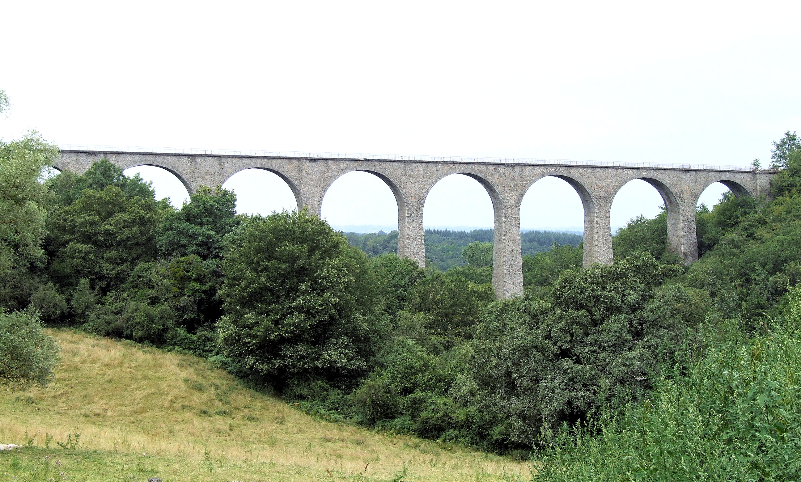 Néris-les-Bains - Viaduc de la voie de chemin de fer